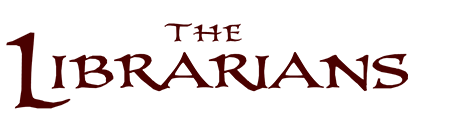 Logo de la série The Librarians